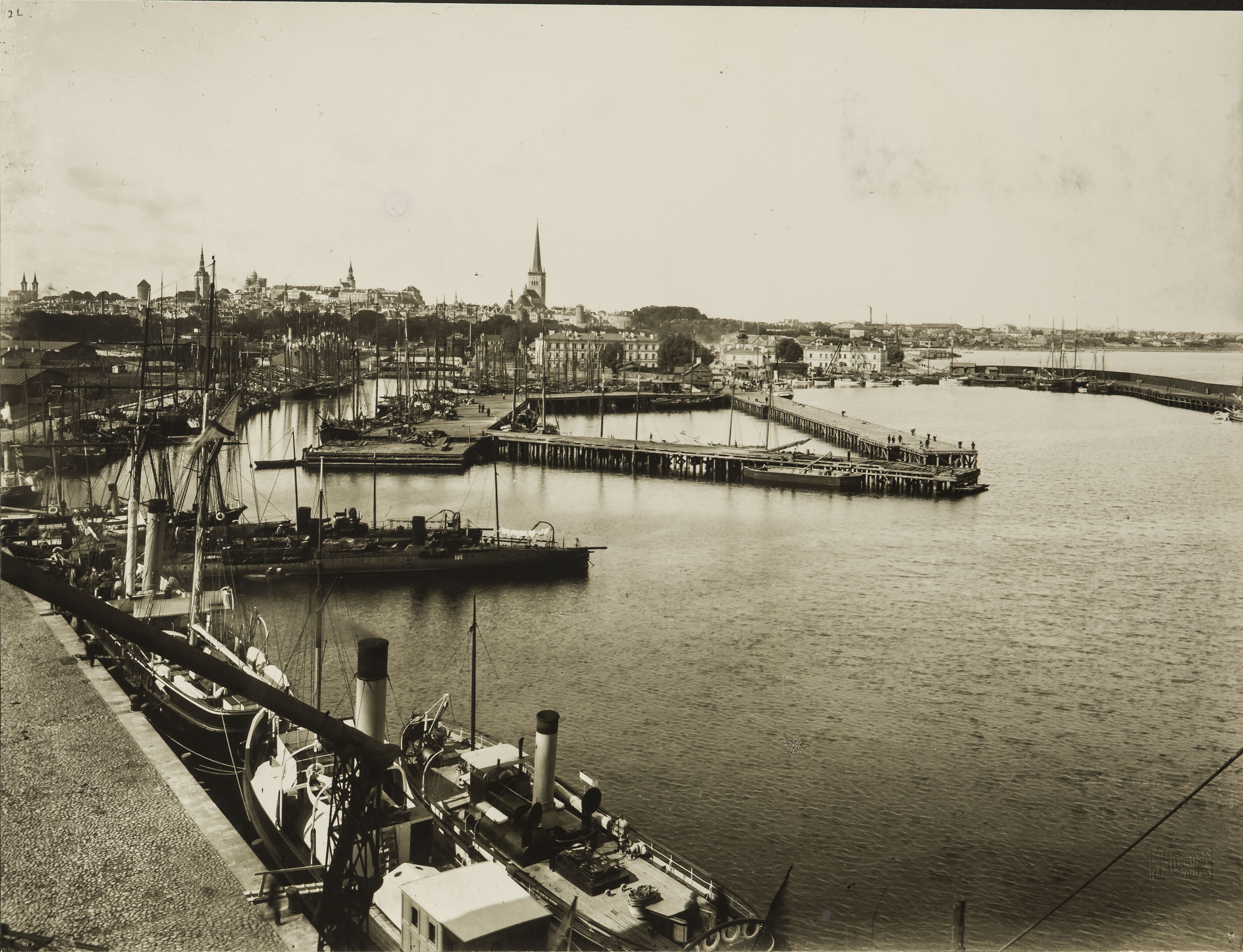 Vana sadam